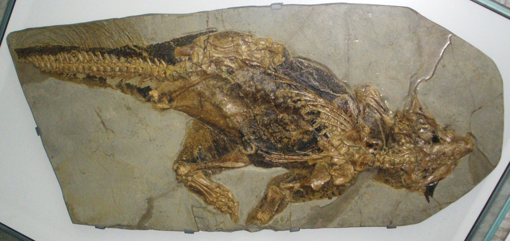 Fossil of Psittacosaurus, an extinct ceratopsian- Took the photo at Senckenberg Museum of Frankfurt